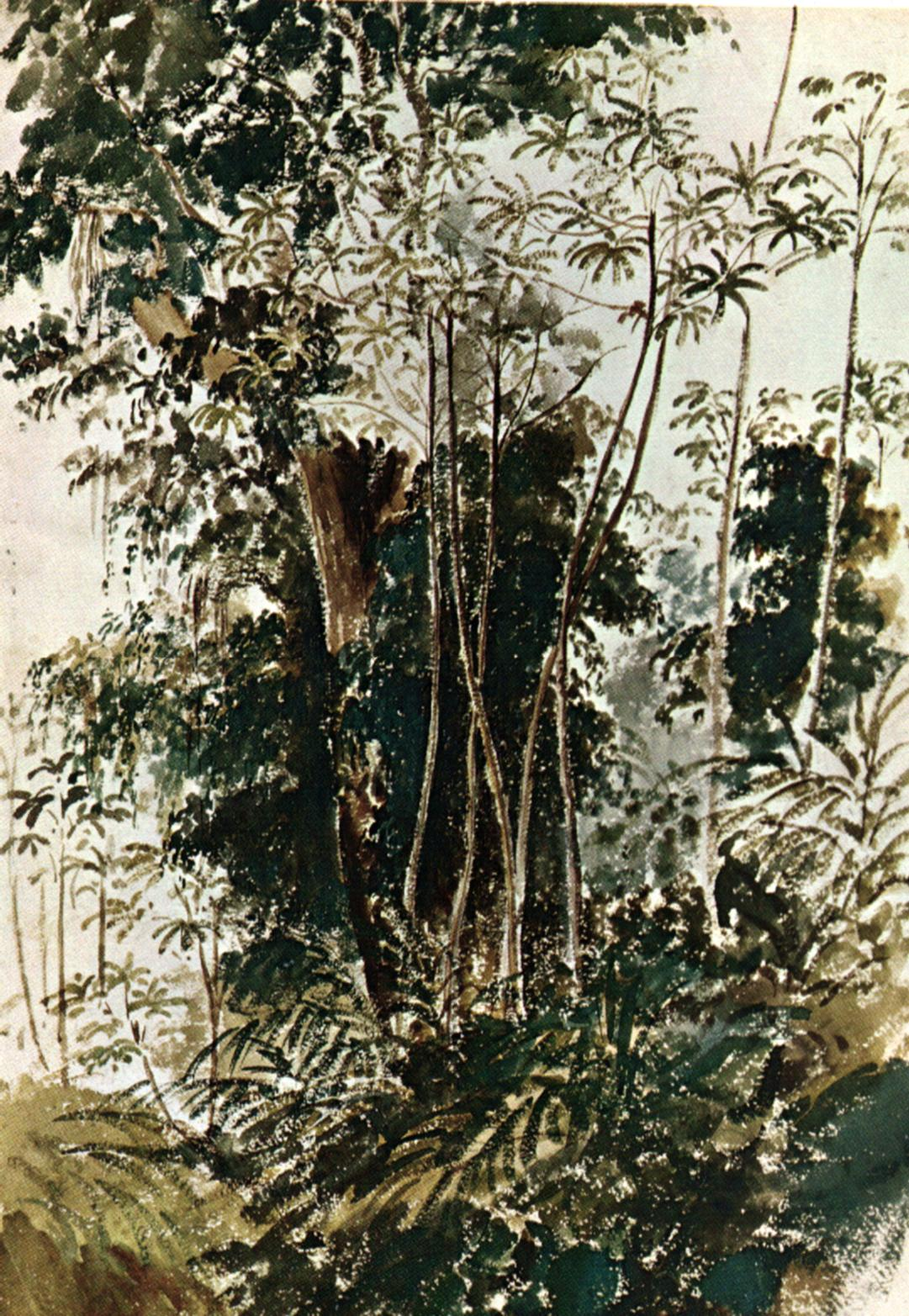 Camille Pissarro: Vegetacion Tropical. (Sin Fecha). Acuarela. 56 x 37 cm. Colección Banco Central de Venezuela Comprada en Hammer Galleries de New York en junio de 1965.